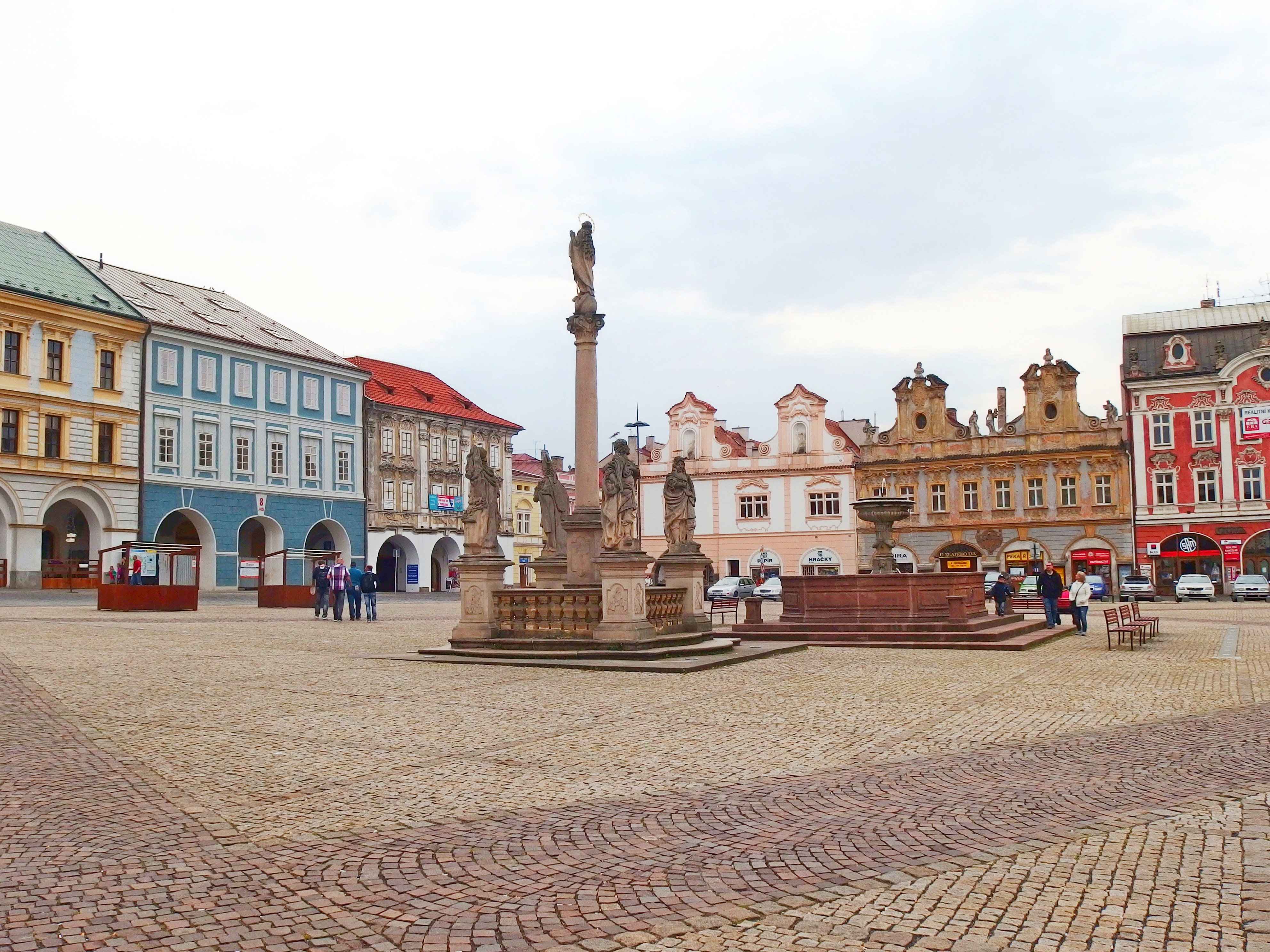 Sloup se sochou Panny Marie Immaculaty se čtyřmi sochami světců, Karlovo náměstí, Kolín I, Kolín.